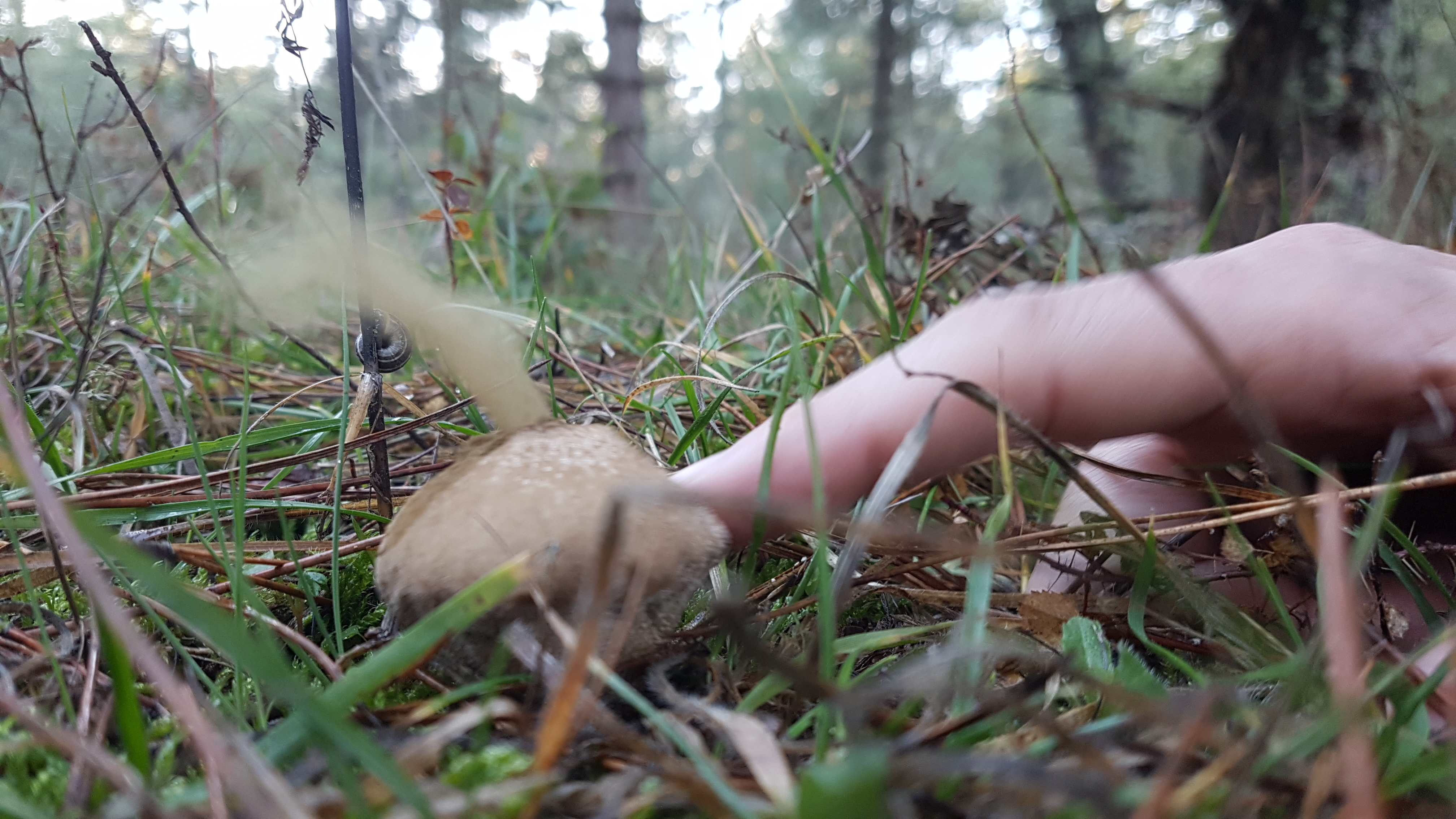 Presión sobre un ejemplar maduro de pedo de lobo que lanza su esporada